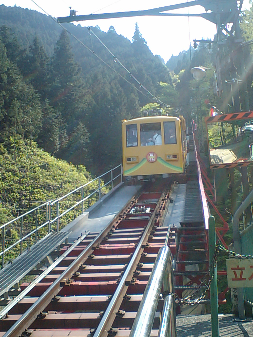 御岳登山鉄道の3代目車両、日出号